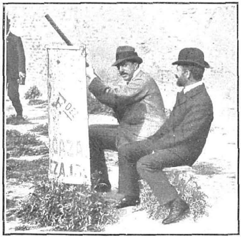 El rey, el marqués de Villaviciosa y el Conde de San Román en sus puestos. (FOTS. NUEVO MUNDO POR CAMPÚA).